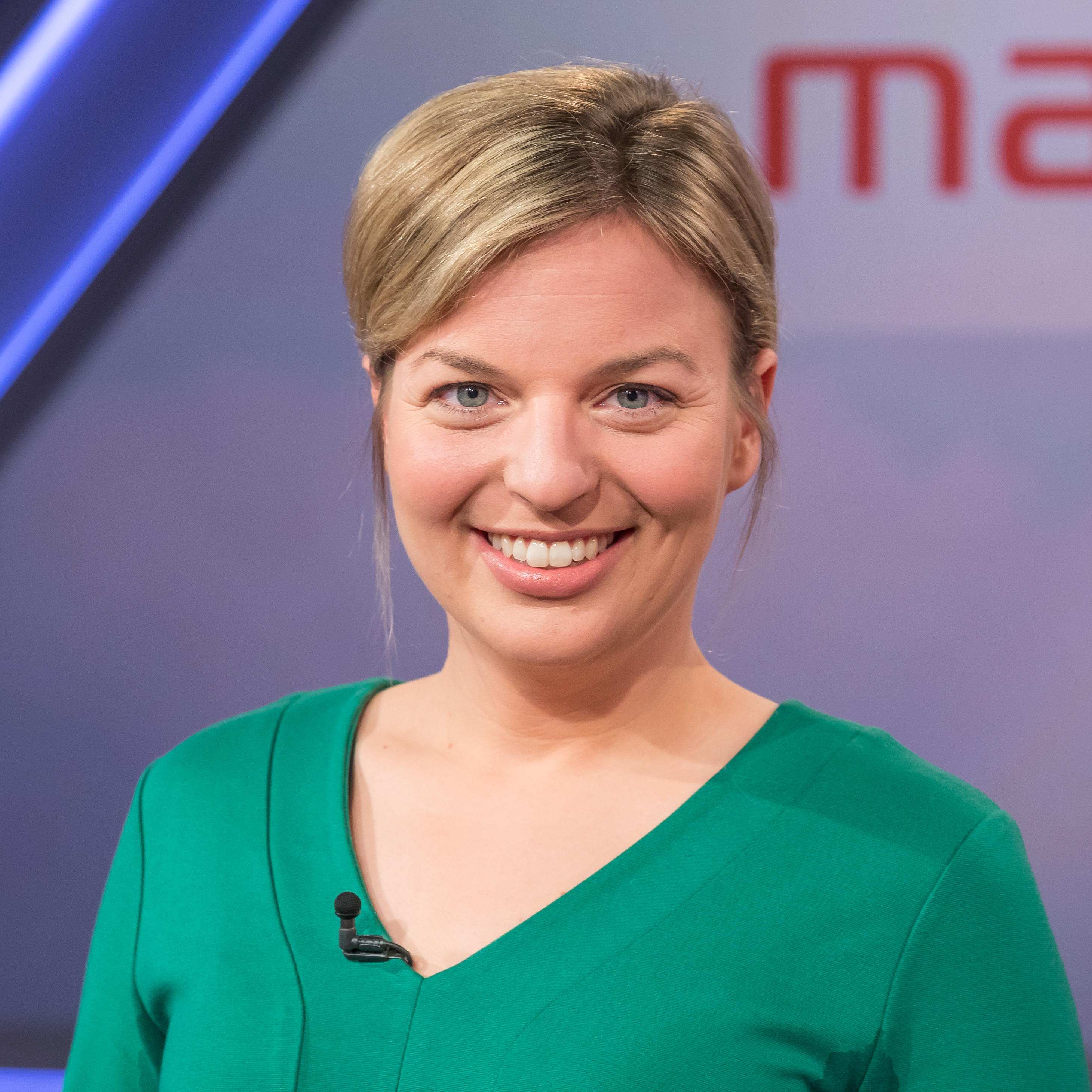 MAISCHBERGER am 27. Februar 2019 in Köln. Produziert vom WDR. Thema der Sendung: „Rettet die Biene, schützt den Wolf: Was ist uns der Naturschutz wert?“ Foto: Katharina Schulze, B’90/Grüne, Fraktionsvorsitzende Bayern